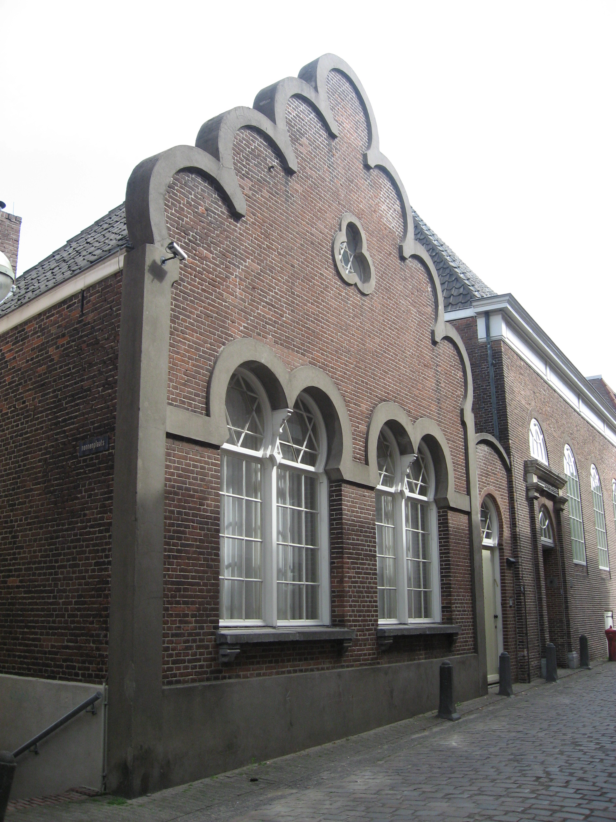 Schooltje aan de Nonnenstraat (hoek Nonnenplaats) van de Nijmeegse architect Pieter van der Kemp (1872-1873)